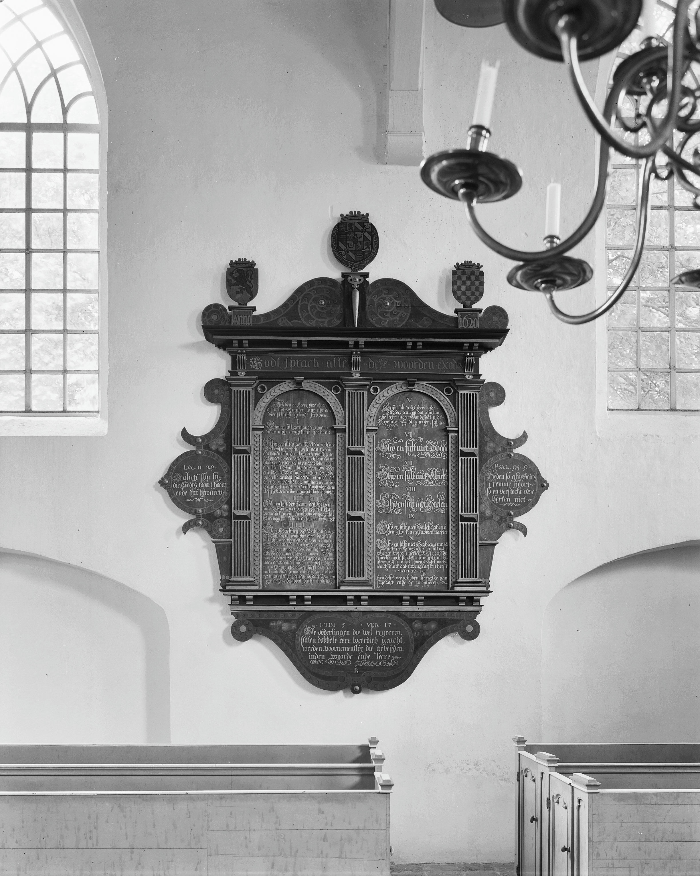 Nederlands Hervormde Kerk: tekstbord